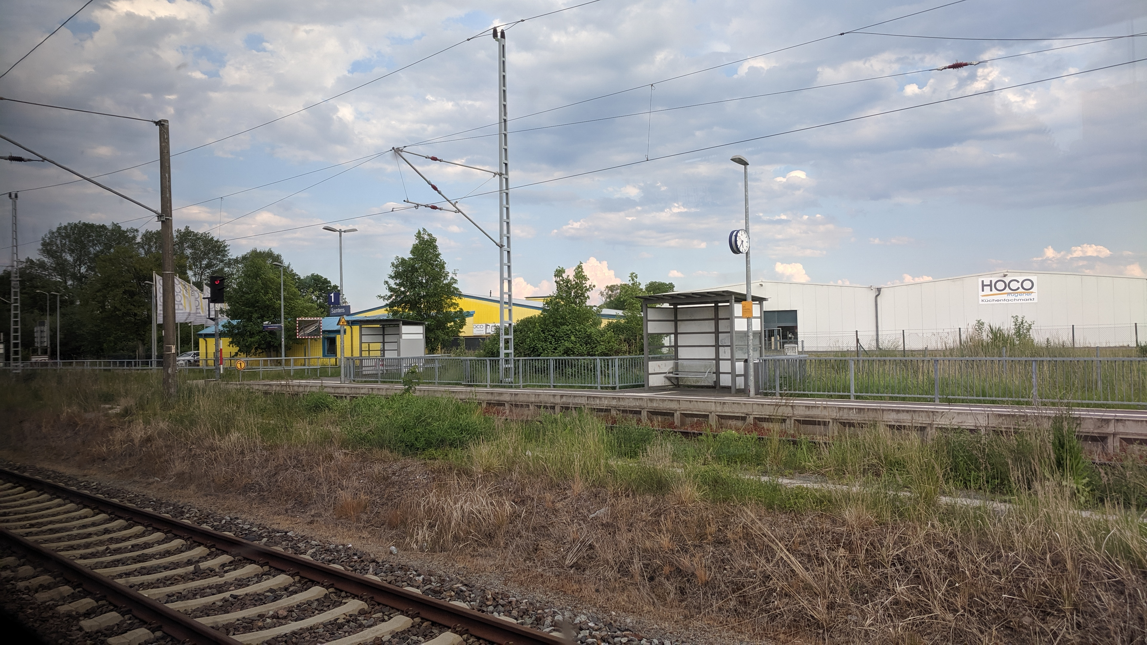 Bahnhof Samtens, Taken on 3 June 2019